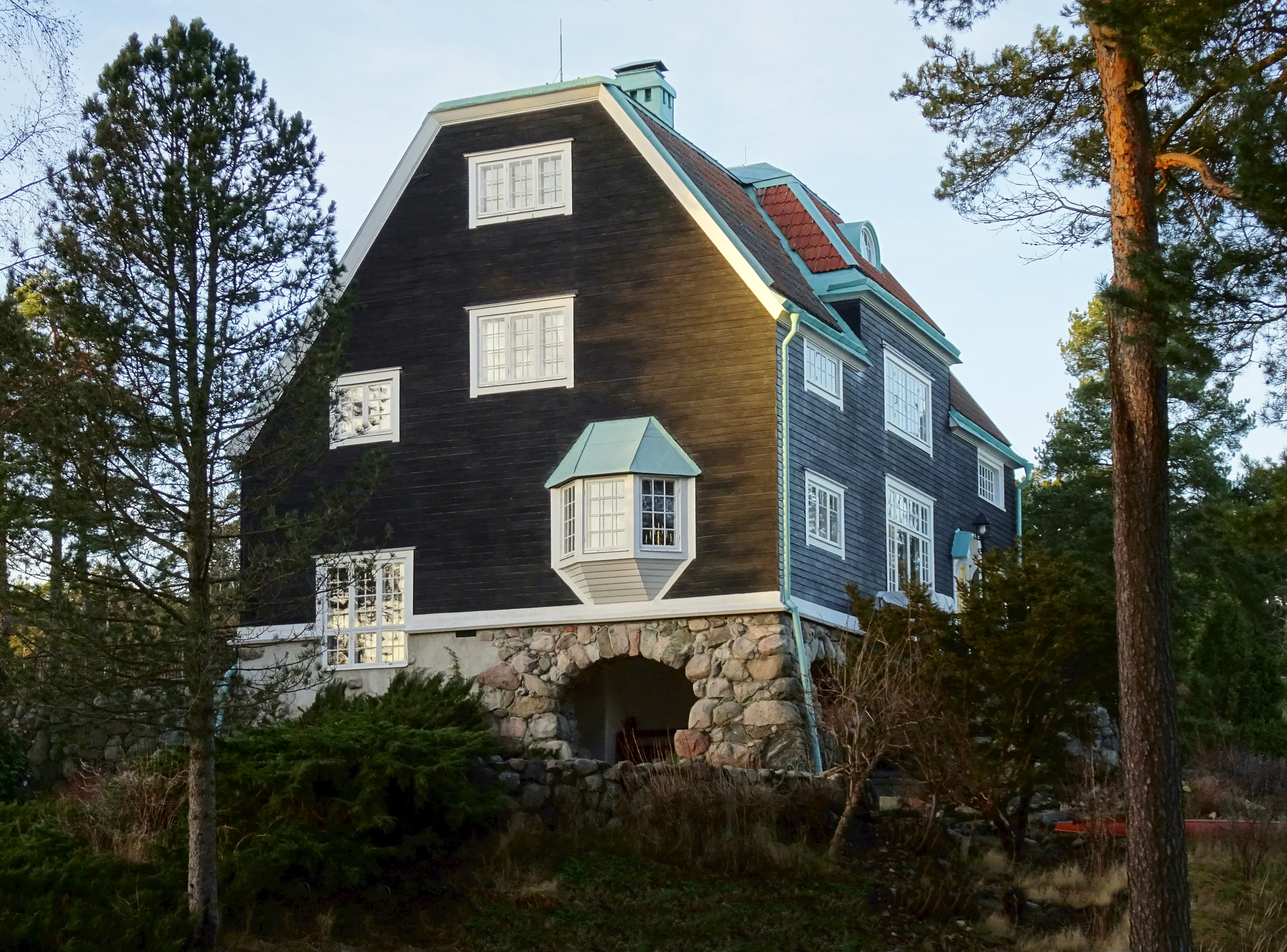 Thulinska villan, Carl Gustav Thulins villa i Saltsjöbaden (även kallad Villa Gistra efter hans hustru Helena Gistrén). Arkitekt Carl Westman (1903), adress Saltsjöpromenaden 38. Carl Gustav Thulin var delägare i rederiet Nordström & Thulin.